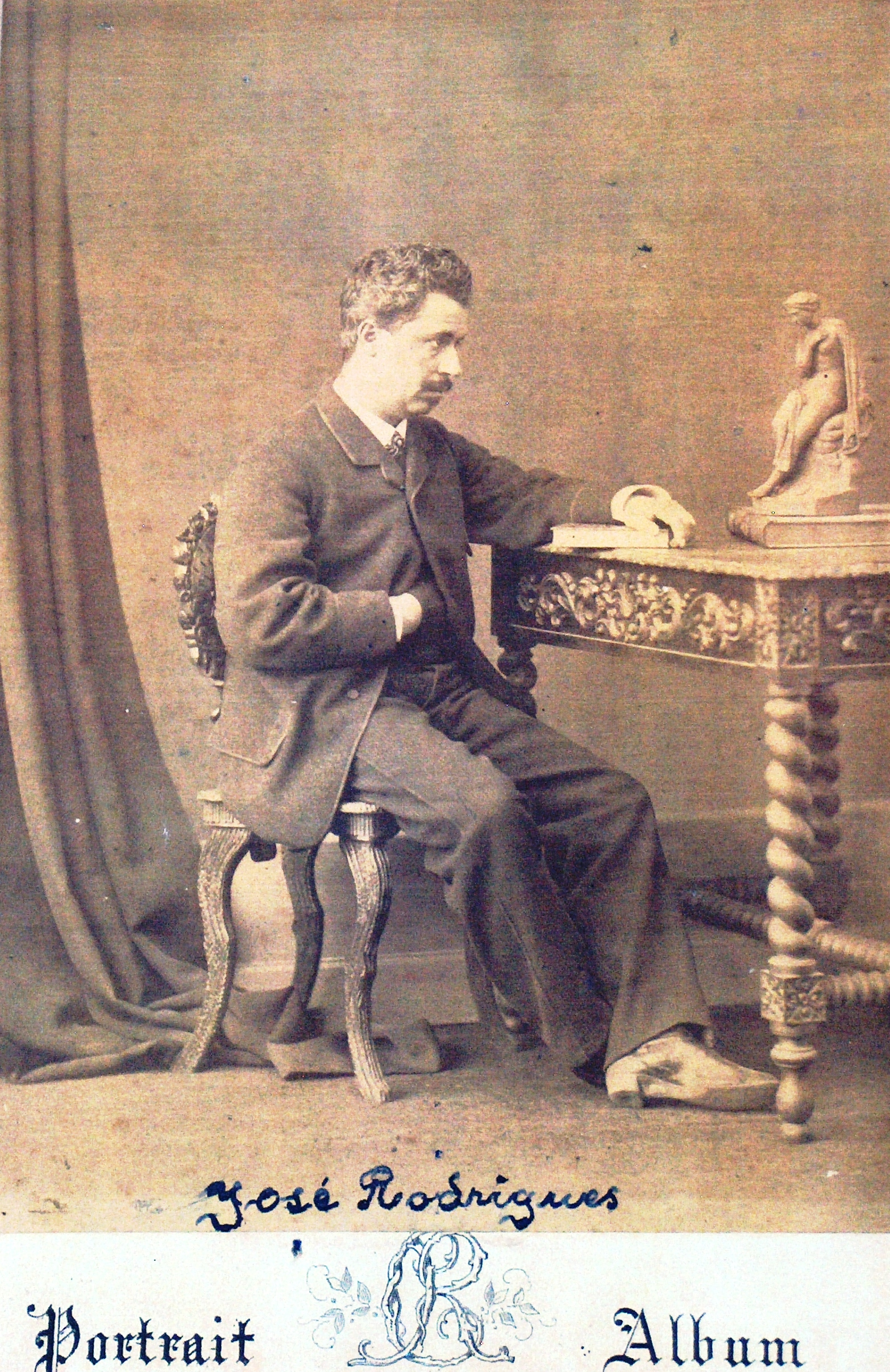 Portrait of José Rodrigues (1828-1887), Portuguese painter